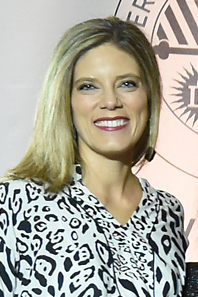 26 Abril 2017. Ministra Paula Narváez participa en premiación a la excelencia periodística organizado por la universidad Padre Hurtado.